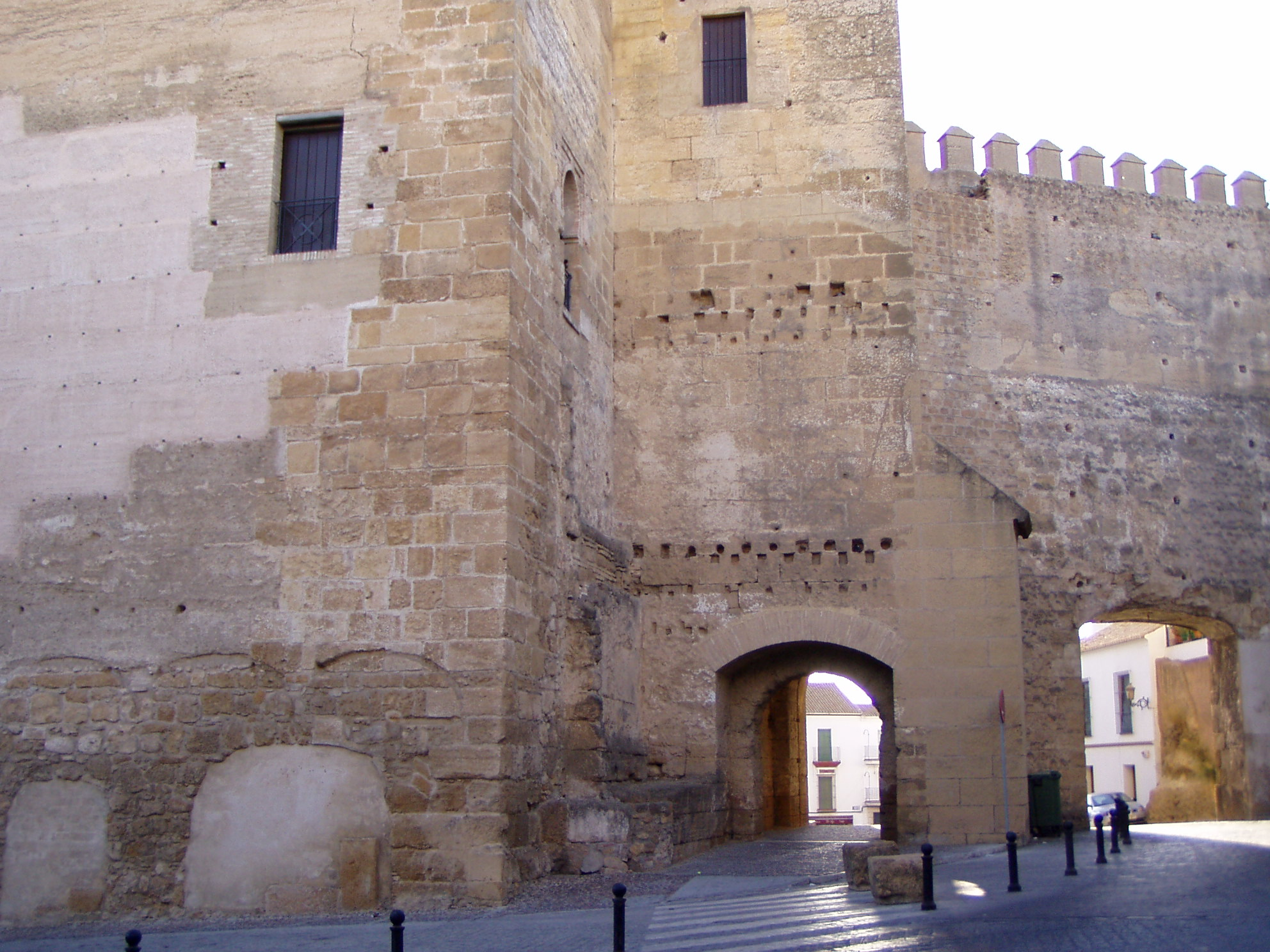 Martin Teetz, September 2005